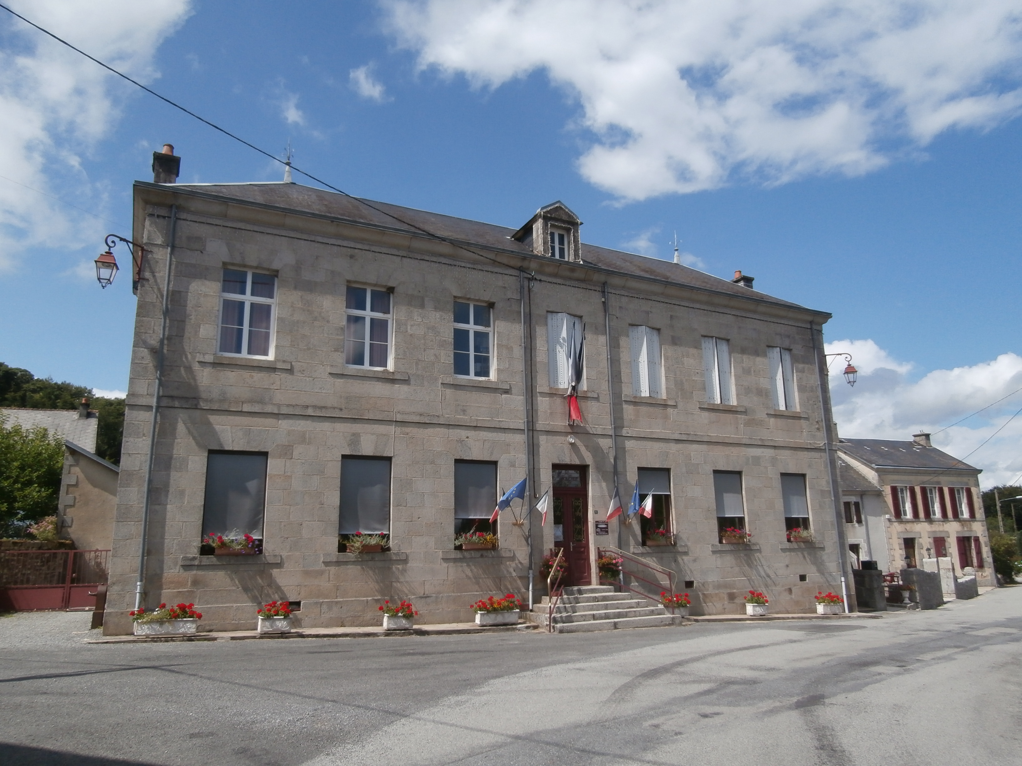 Mairie